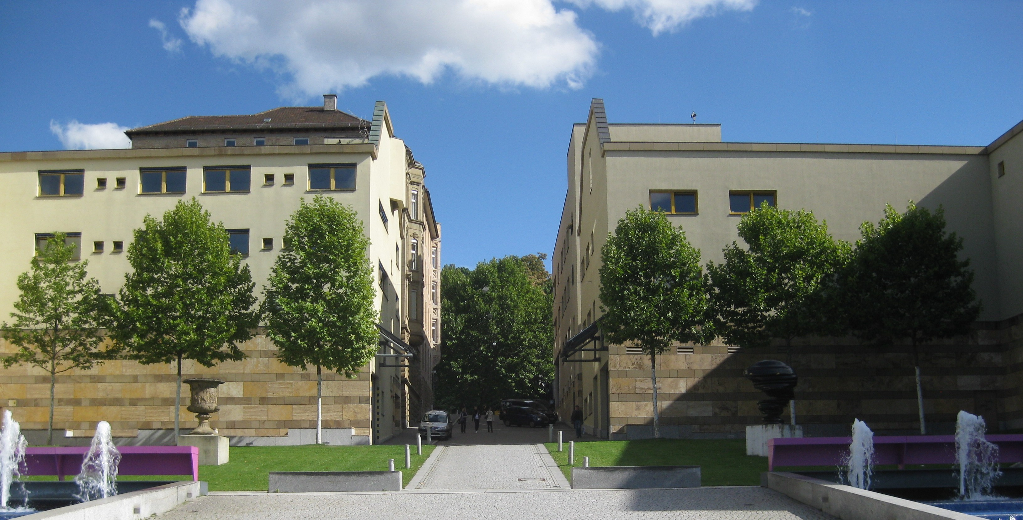 Stuttgart, zwischen Kammertheater und Haus der Geschichte, links: Liebesvase von Friedrich Distelbarth, rechts: Skulptur „Points of View“ von Tony Cragg.